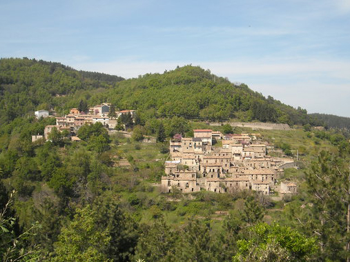 San Giovanni in Fiore - Fantino vecchia (in basso) e Fantino nuova (in alto)